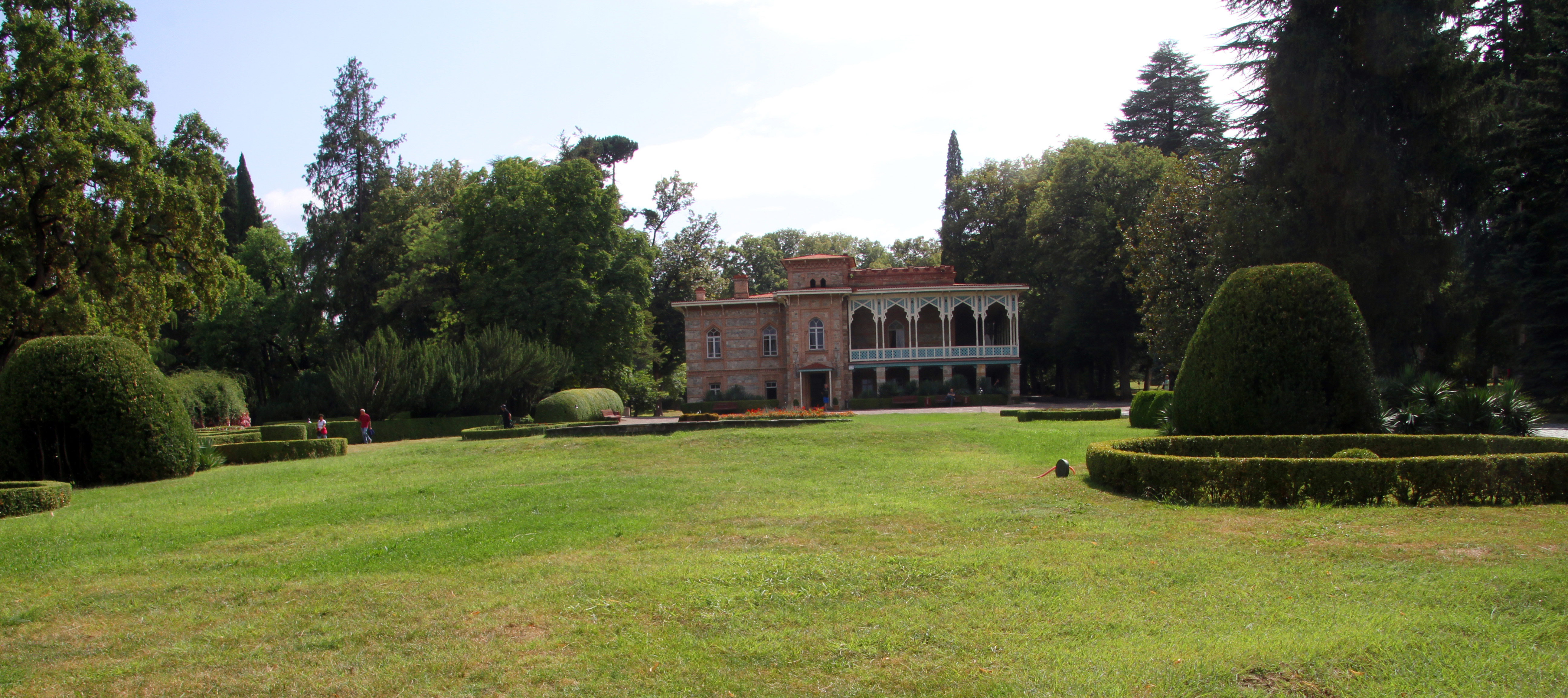 Tsinandali, Museum und Weingut